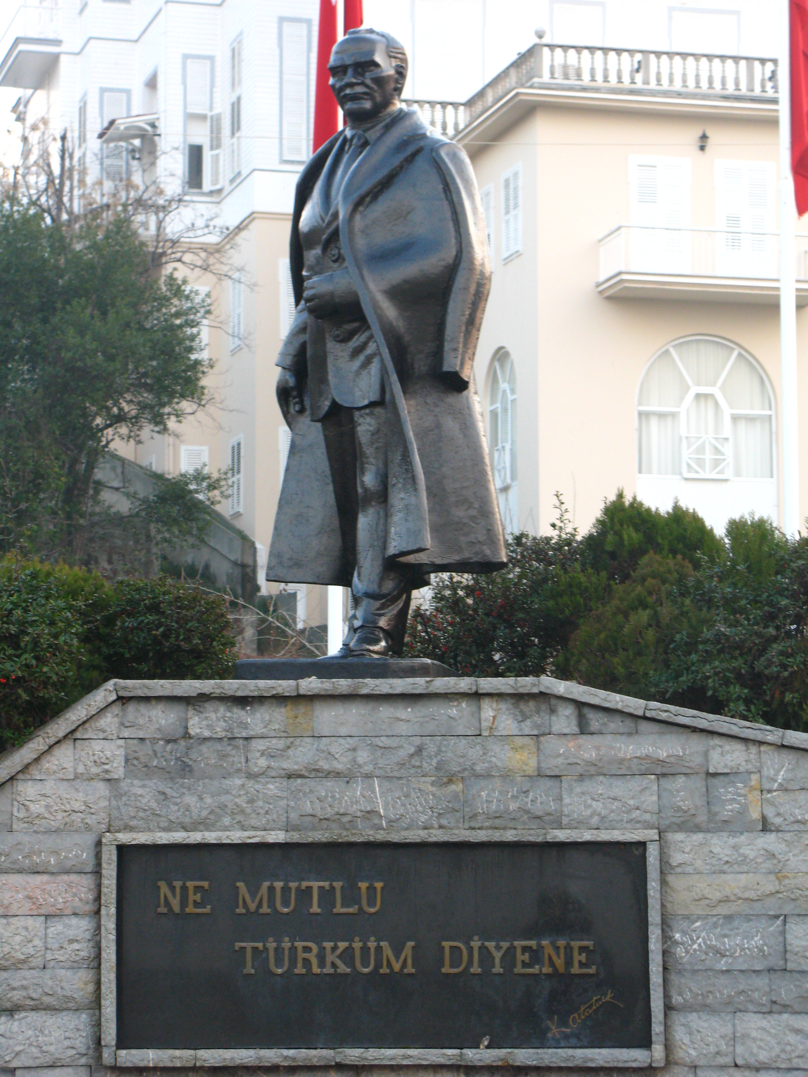 Statue of Kemal Ataturk in Büyükada